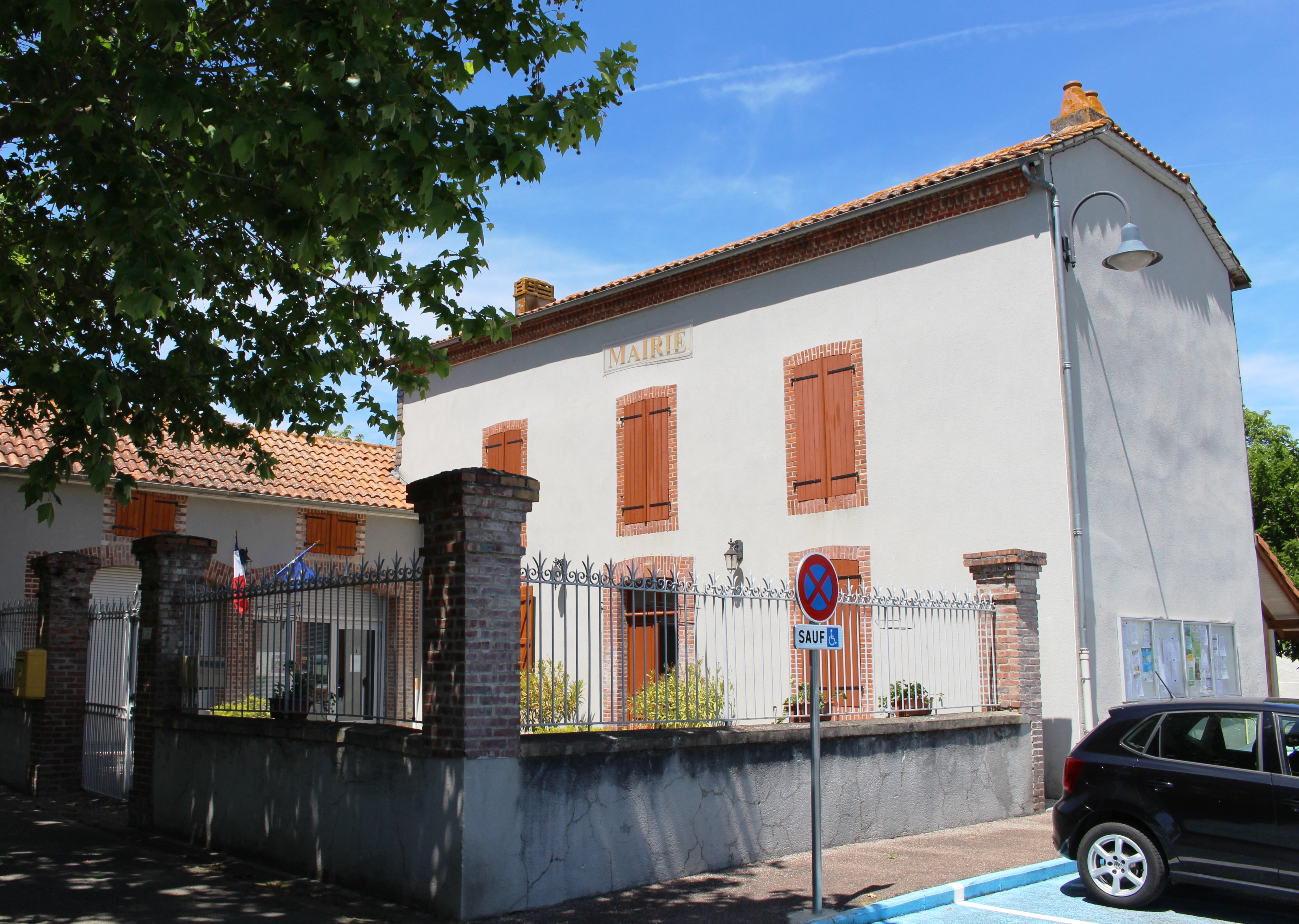 Mairie de Chis (Hautes-Pyrénées)